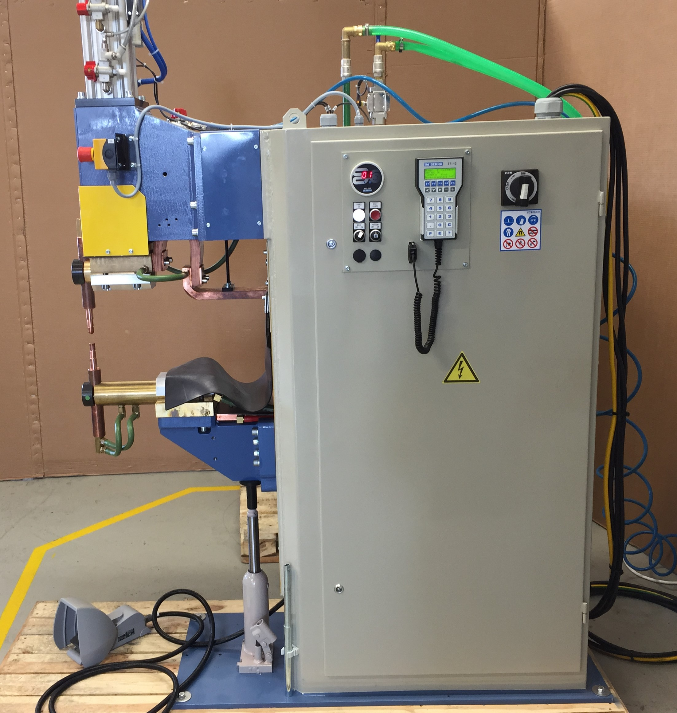 Bodová zváračka